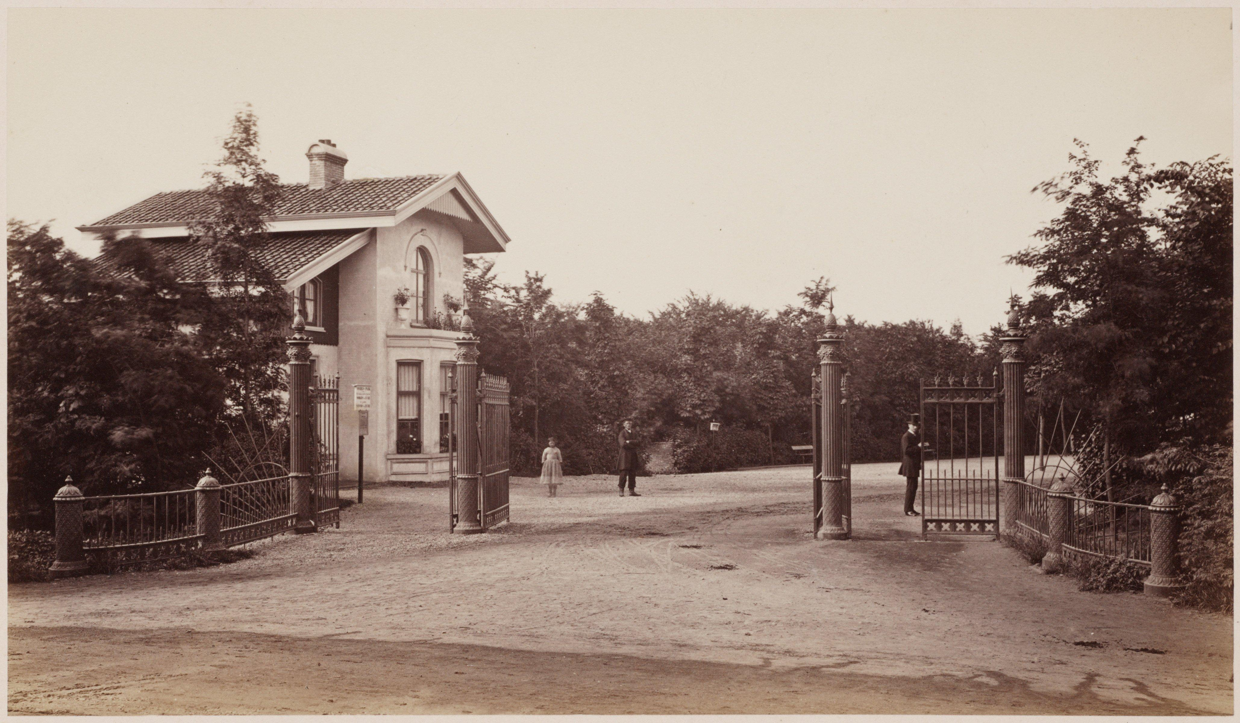 Beschrijving Vondelpark De ingang van het park aan de Stadhouderskade met de opzichterswoning naar ontwerp van L.P. Zocher (1867). Blad 1 uit het album 'Rij- en Wandelpark', aangeboden aan Chr.P. van Eeghen ter gelegenheid van zijn 25-jarig huwelijk op 6 oktober 1867. De woning werd vanaf december 1867 bewoond; de foto is in de zomer van het jaar daarop gemaakt. Documenttype foto Vervaardiger Oosterhuis, Pieter Collectie Collectie Stadsarchief Amsterdam: bibliotheek Datering 1868 Geografische naam Vondelpark Stadhouderskade Geportretteerde Eeghen, C.P. van (Christiaan Pieter, 1816-1889) Inventarissen Afbeeldingsbestand B00000029234 Generated with Dememorixer